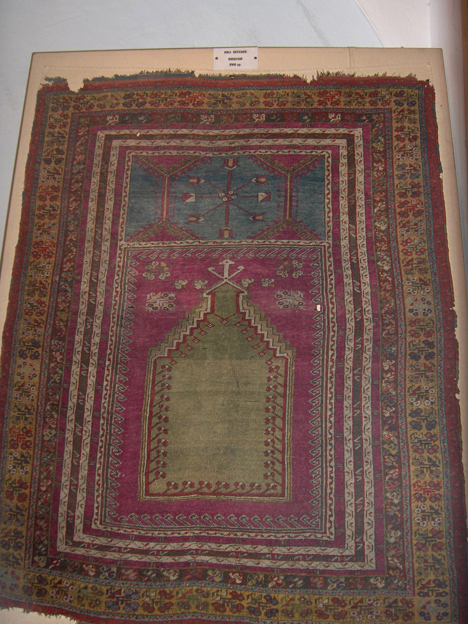 Kirşehir praying rug (18th c.); Mevlâna mausoleum; Konya, Turkey